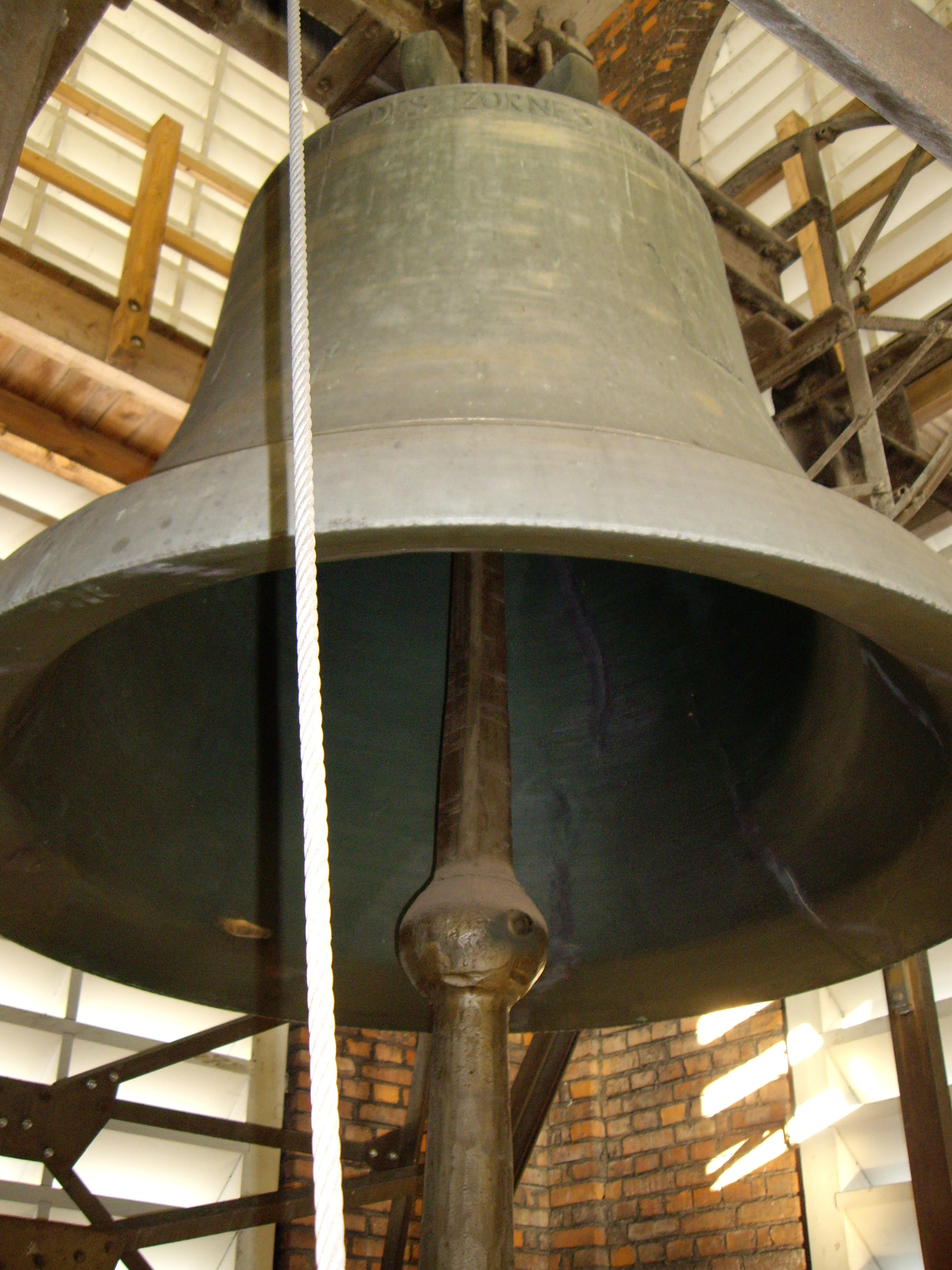 Große Korbiniansglocke in St. Korbinian in München-Sendling